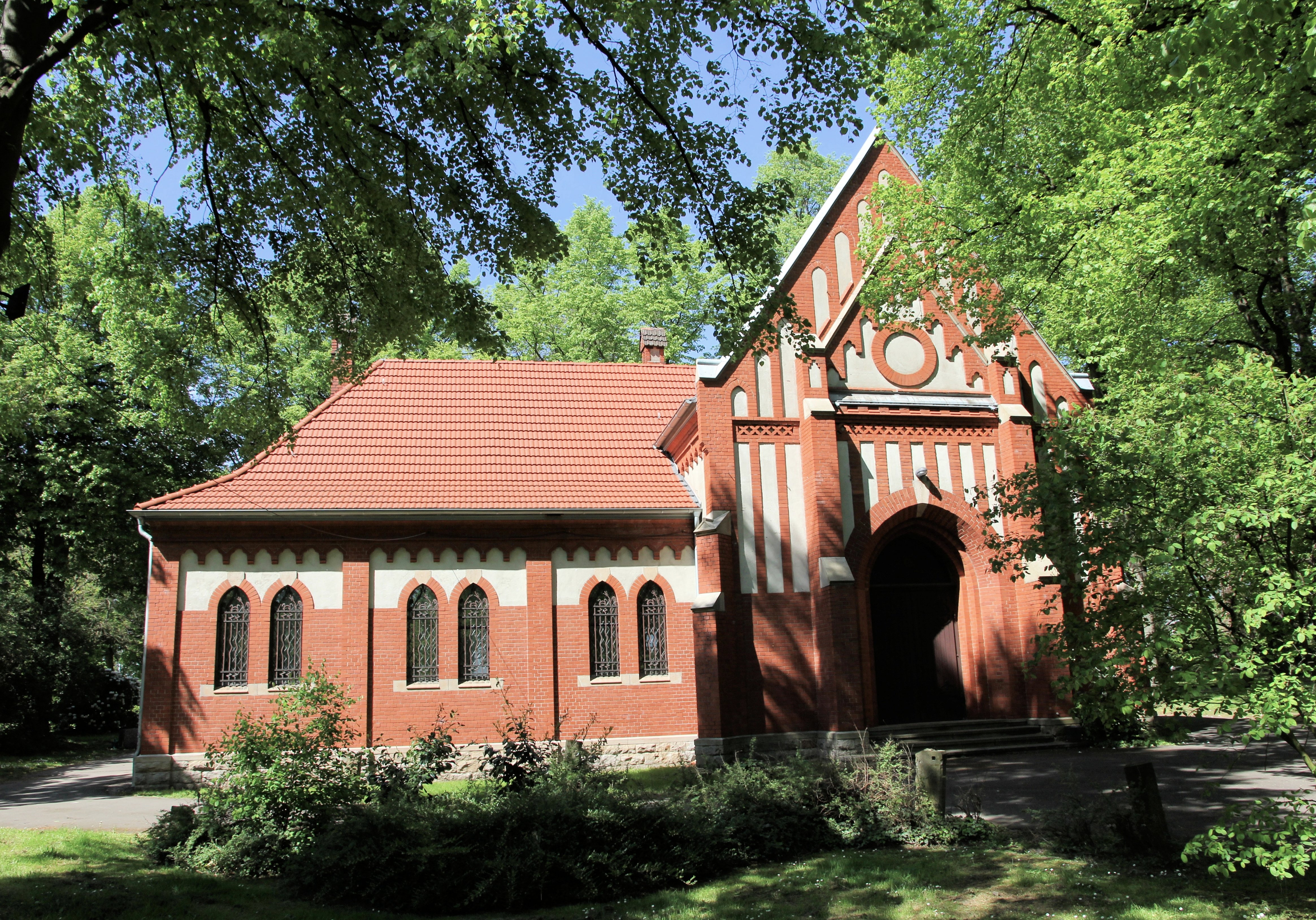 Sanierte Trauerhalle auf dem Kommunalfriedhof in Dortmund-Aplerbeck